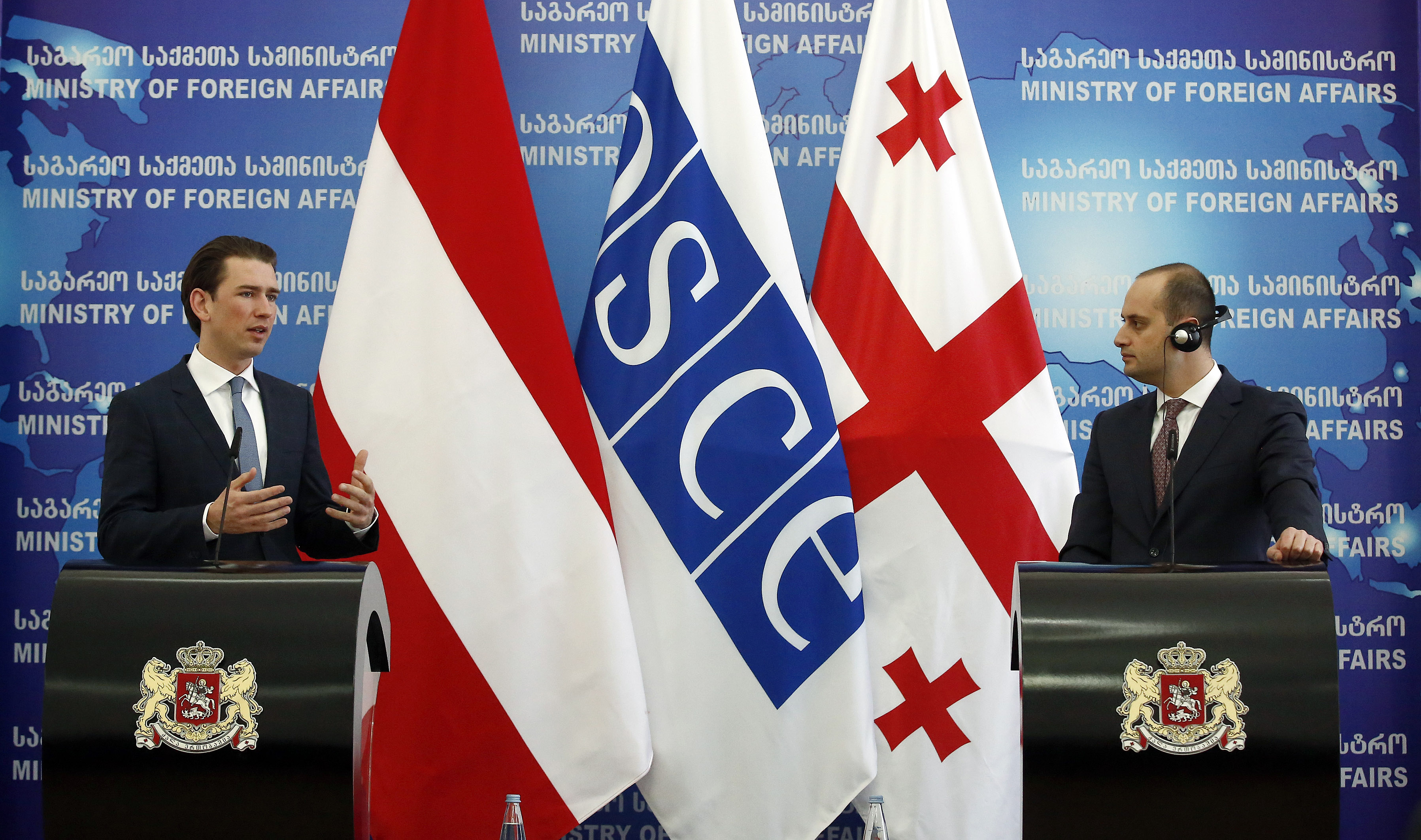 OSCE Arbeitsbesuch Georgien. Bundesminister Sebastian Kurz trifft den georgischen Außenminister Mikhail Janelidze. Tiflis. 03.02.2017, Foto: Dragan Tatic